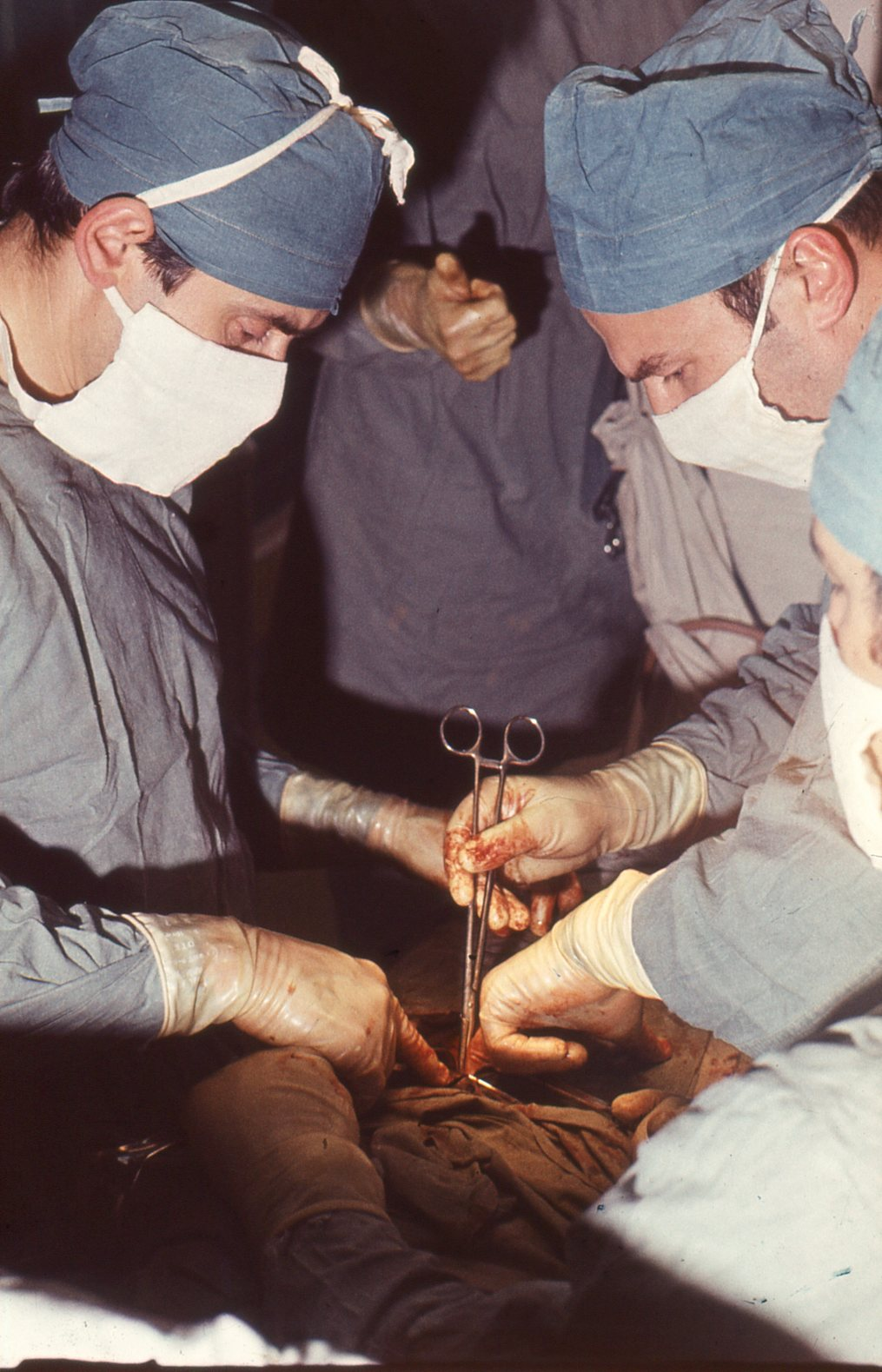 операция